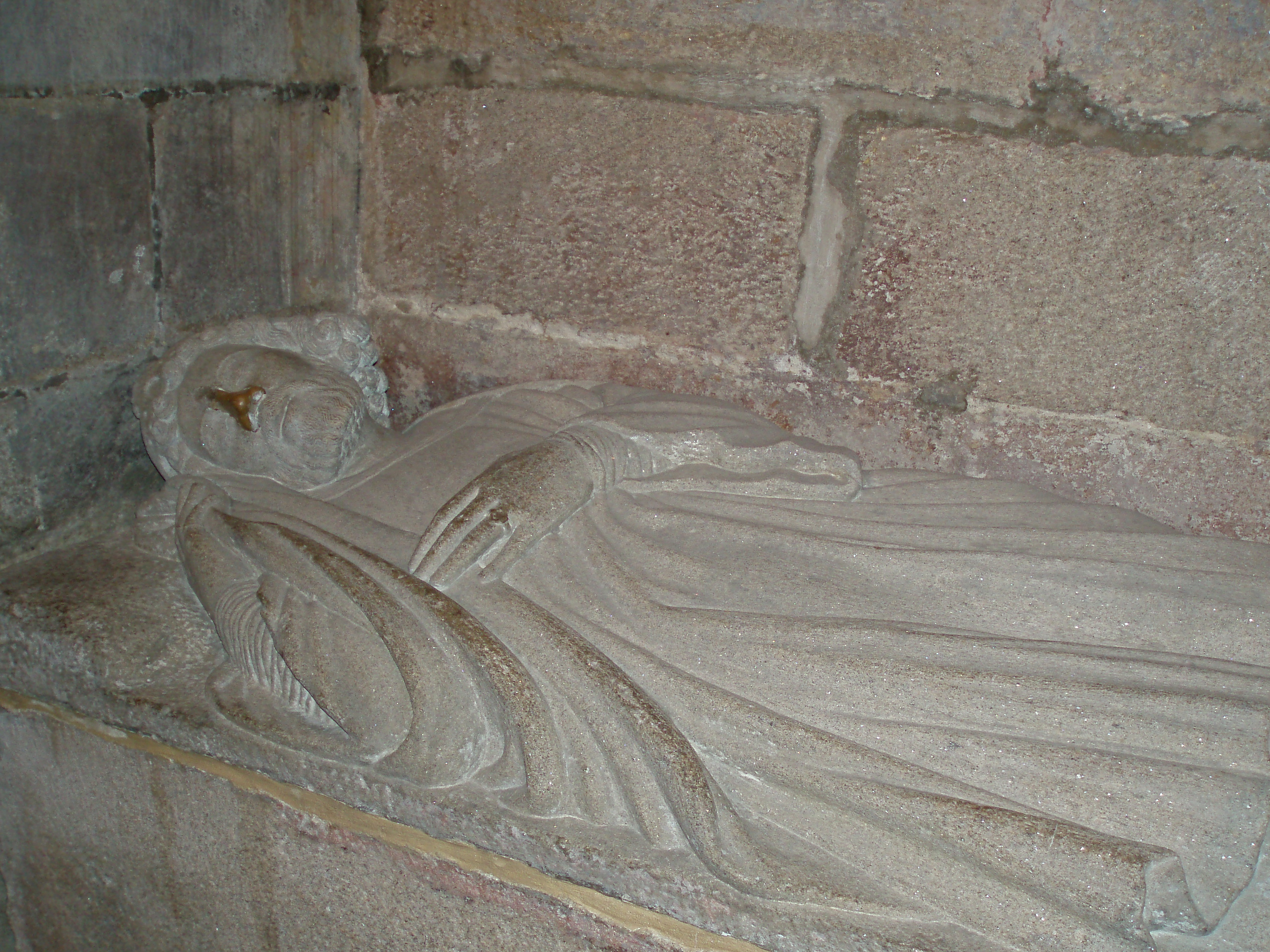 Sepulcro del rey Fernando II de Galicia y León, en la capilla de las Reliquias de la catedral de Santiago de Compostela.